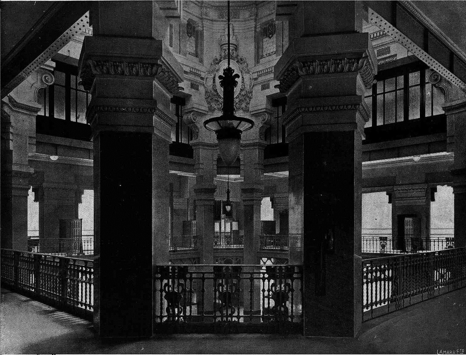 Tercera planta del edificio del Banco Español del Río de la Plata, en Madrid.